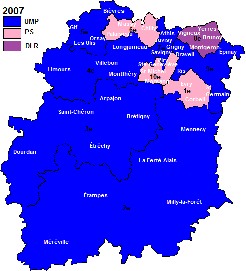 Carte politique des circonscriptions du département de l'Essonne à l'issue des élections législatives de 2007